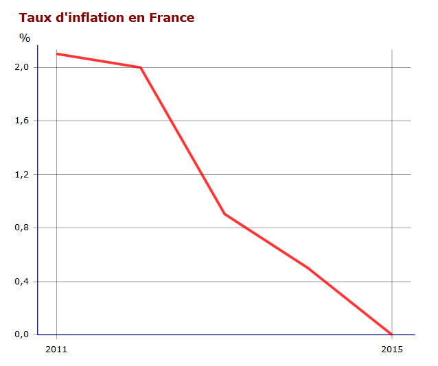 Indice des prix à la consommation